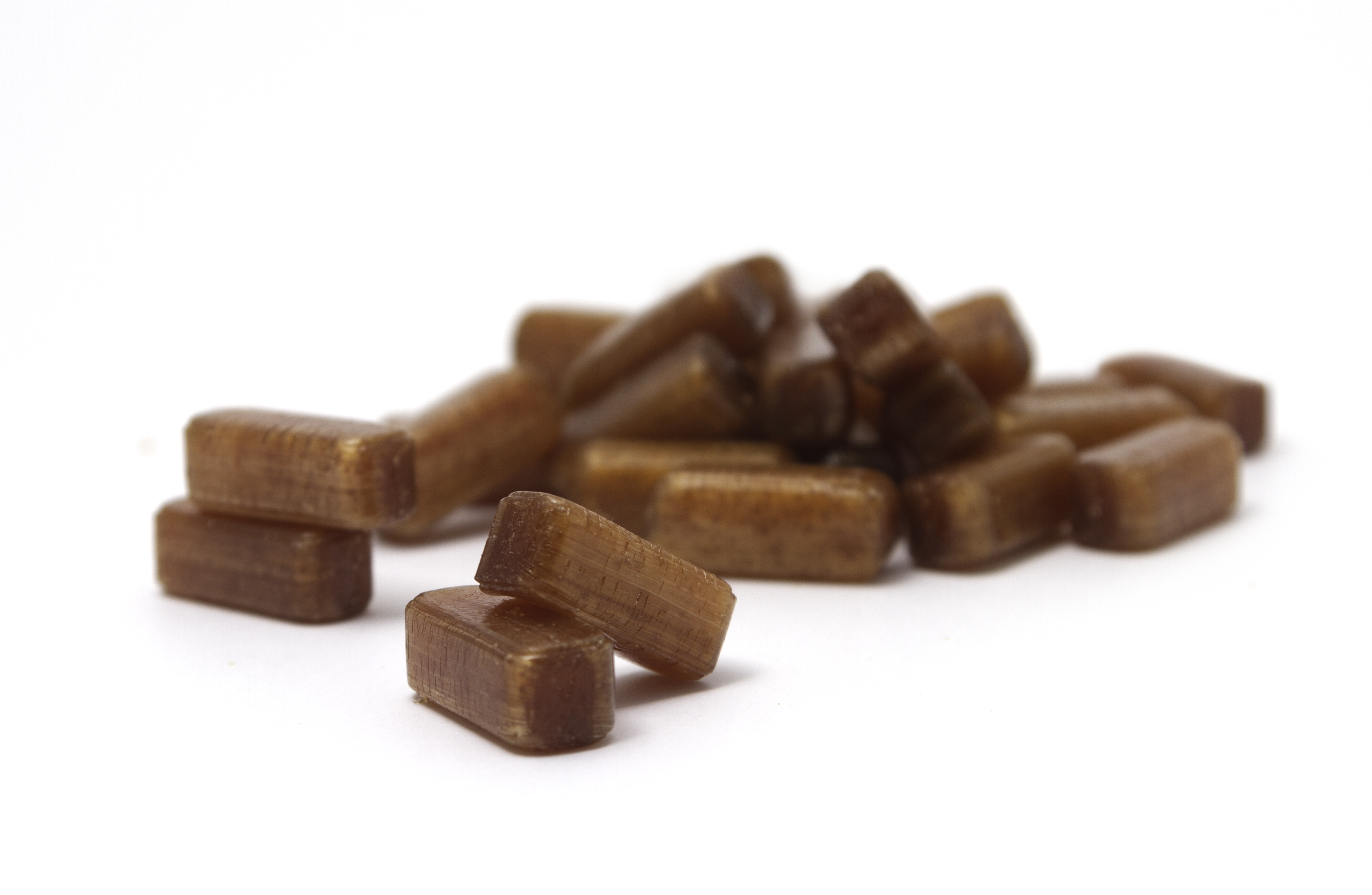 Rotterdammertjes in de vorm van bouwsteentjes, verwijzend naar de wederopbouw en architectuur van de stad.